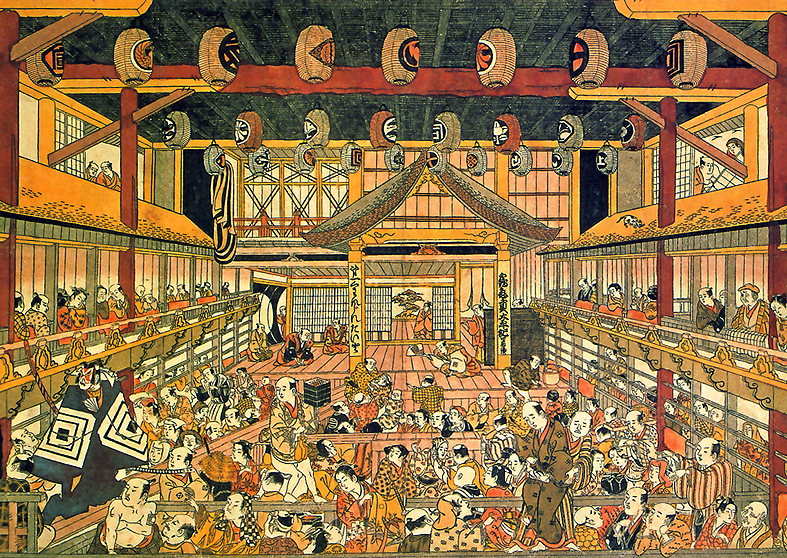 "Спектакль кабуки". Музей Хираки Укиё-э, Токио.